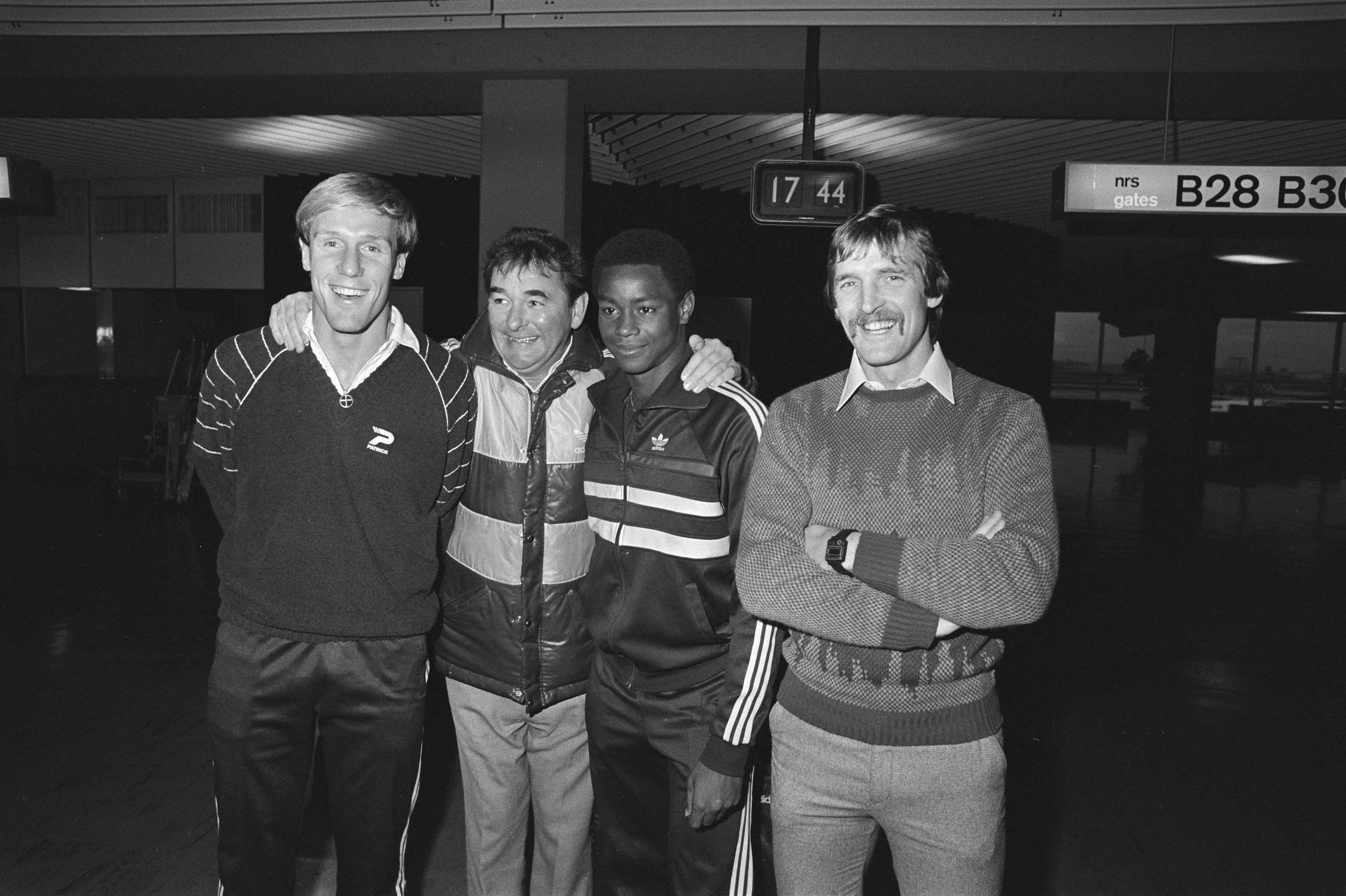 Collectie / Archief : Fotocollectie Anefo Reportage / Serie : Aankomst FC Barcelona op Schiphol in verband met wedstrijd tegen NEC Beschrijving : Aankomst van Nottingham Forest op Schiphol; v.l.n.r. doelman Van Breukelen, manager Brian Clough en spelers Fairclough en Thijssen Datum : 17 oktober 1983 Locatie : Noord-Holland, Schiphol Trefwoorden : aankomst en vertrek, managers, voetbal, voetballers Persoonsnaam : Breukelen, Hans van, Clough, Bryan, Fairclough, Chris, Thijssen, Frans Fotograaf : Bogaerts, Rob / Anefo Auteursrechthebbende : Nationaal Archief Materiaalsoort : Negatief (zwart/wit) Nummer archiefinventaris : bekijk toegang 2.24.01.05 Bestanddeelnummer : 932-7347